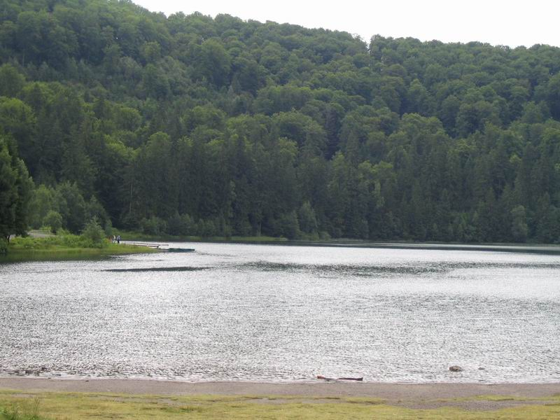 Szentanna-tó - Erdélyben